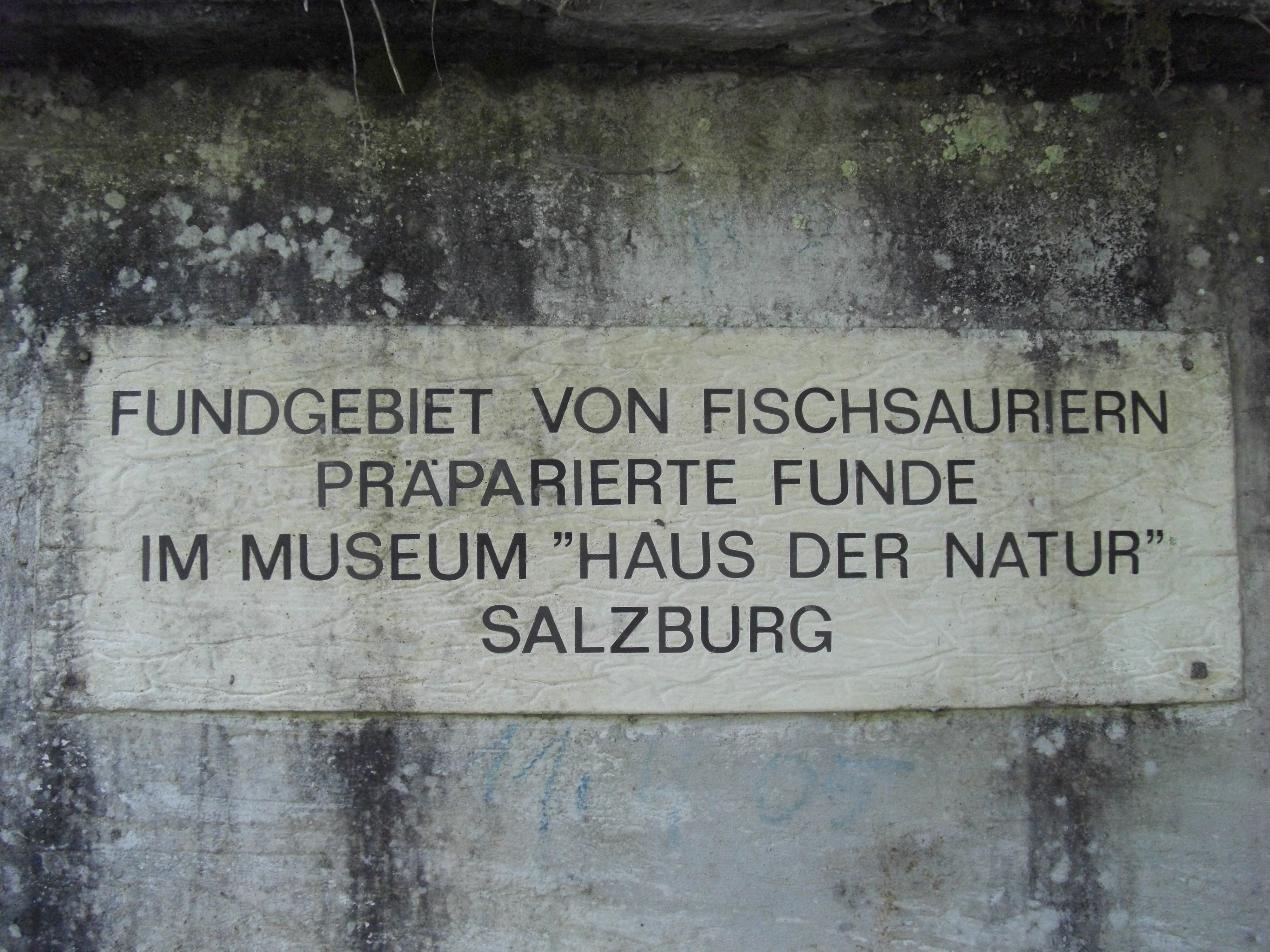 Schild bei der Saurierfundstelle in der Glasenbachklamm